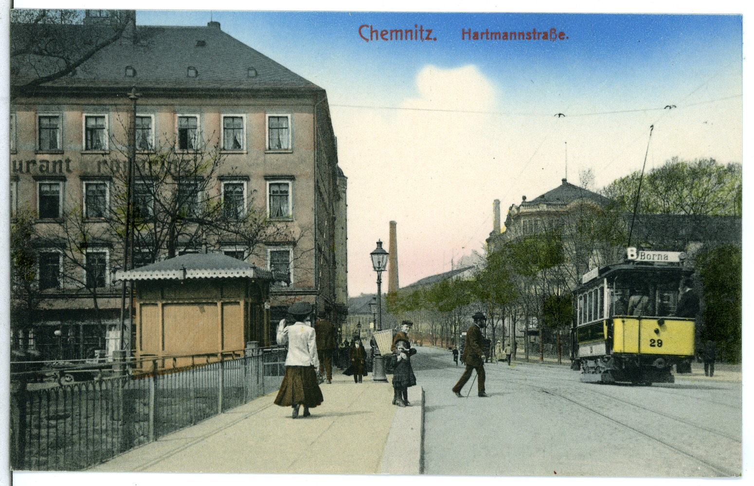 Chemnitz; Hartmannstraße mit Straßenbahn This postcard is from publisher Brück & Sohn in Meißen ( postcard has a unique number 12143 and is available in a higher resolution at the publisher. This images was uploaded in a cooperation project between Wikipedians and the publisher.